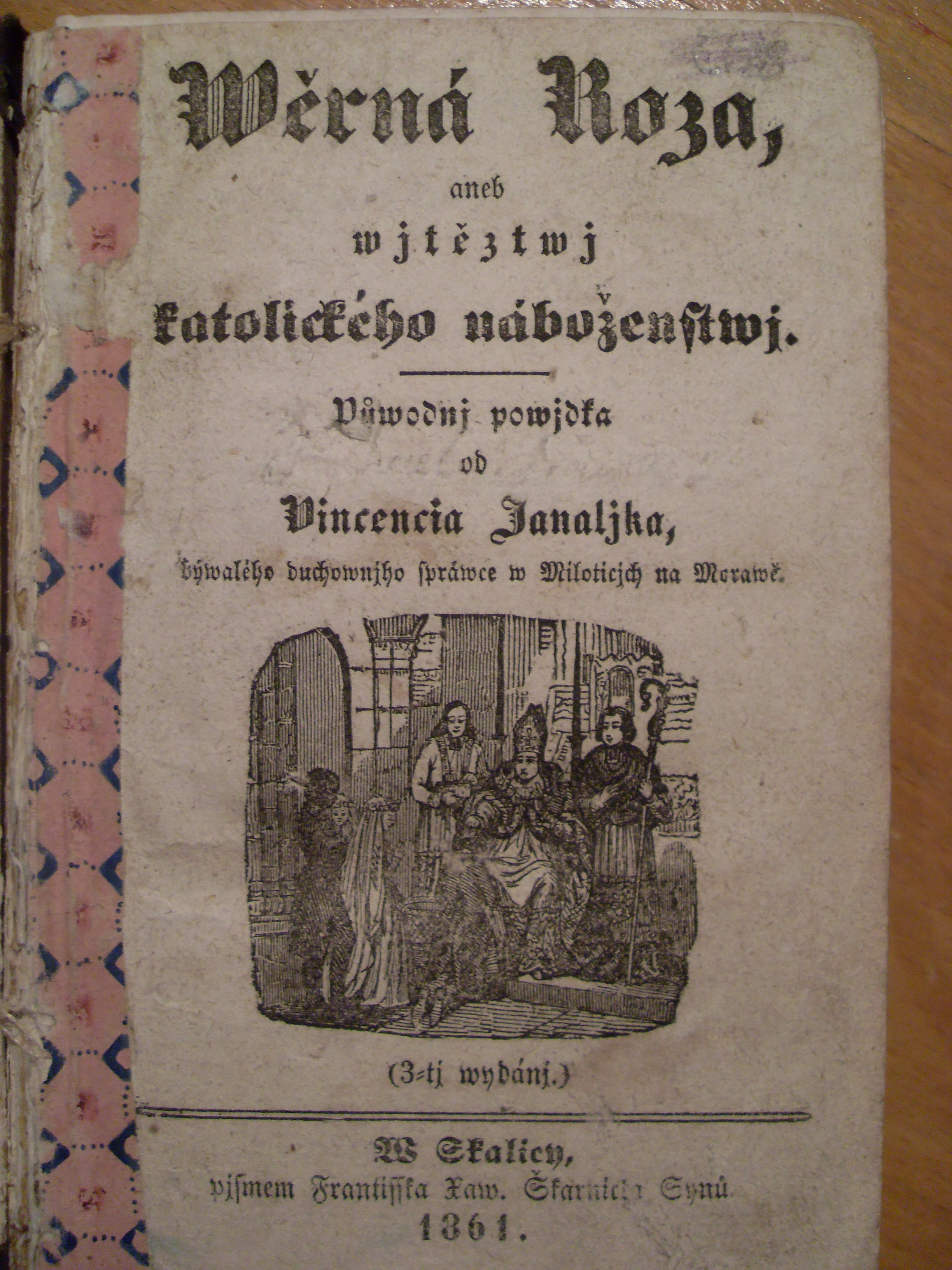 Titulní strana novely Vincence Janalíka Věrná Róza, 3. vydaní, 1861.